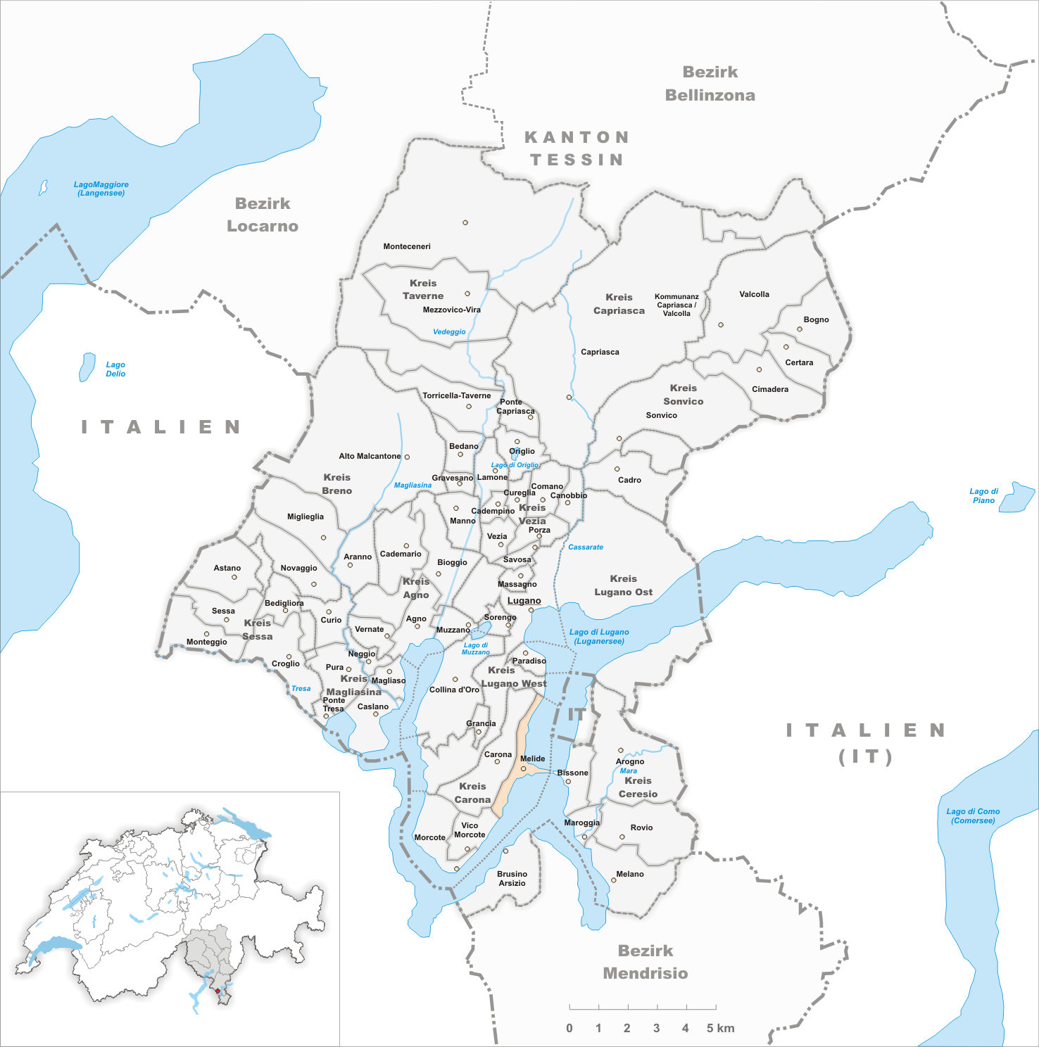 Municipality Melide